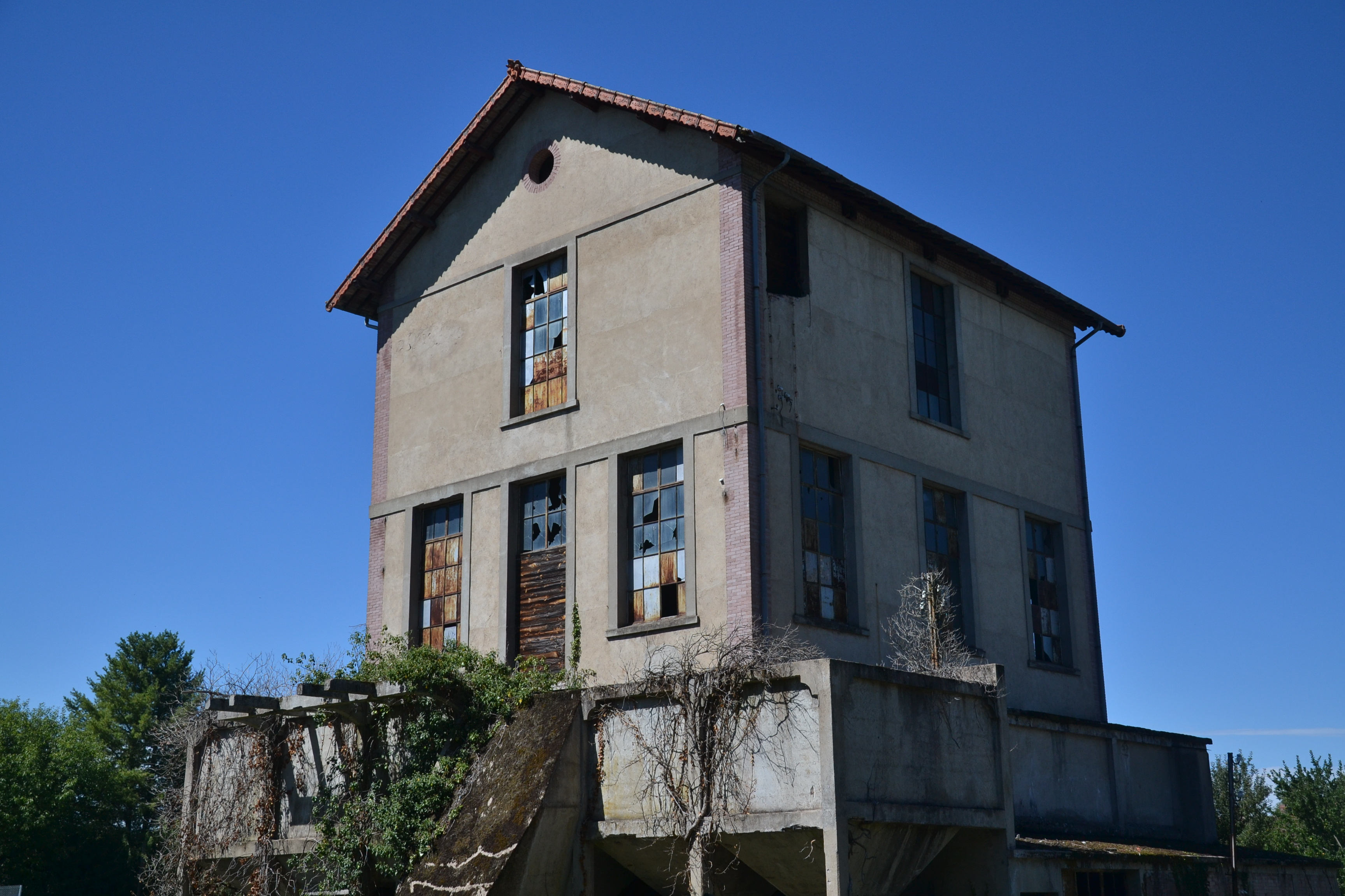 Ancienne laverie (lavoir à charbon) des mines de charbon de Lavaveix-les-Mines (Creuse, France) sur le site de l'ancien puits Central.